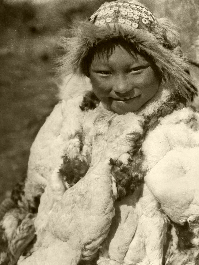 Schneehasenfell? / Vogelfell?- (Kindermantel der Uyowutcha auf der Insel Nunivak im Beringmeer, 1930).